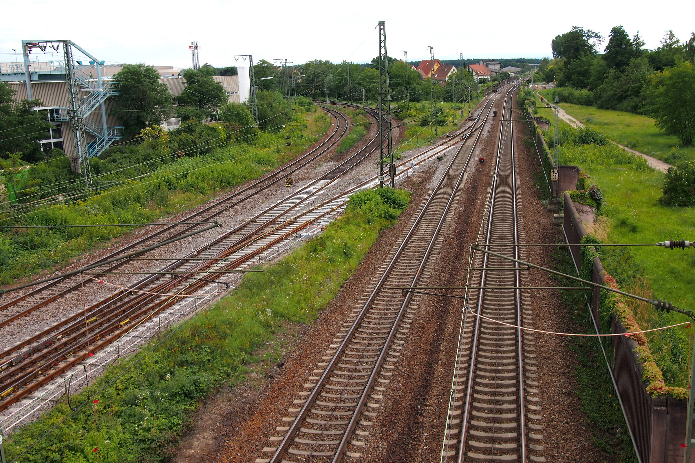 Bruhrainbahn (links) und Rheintalbahn (rechts) in Graben-Neudorf. Blick nach Süden